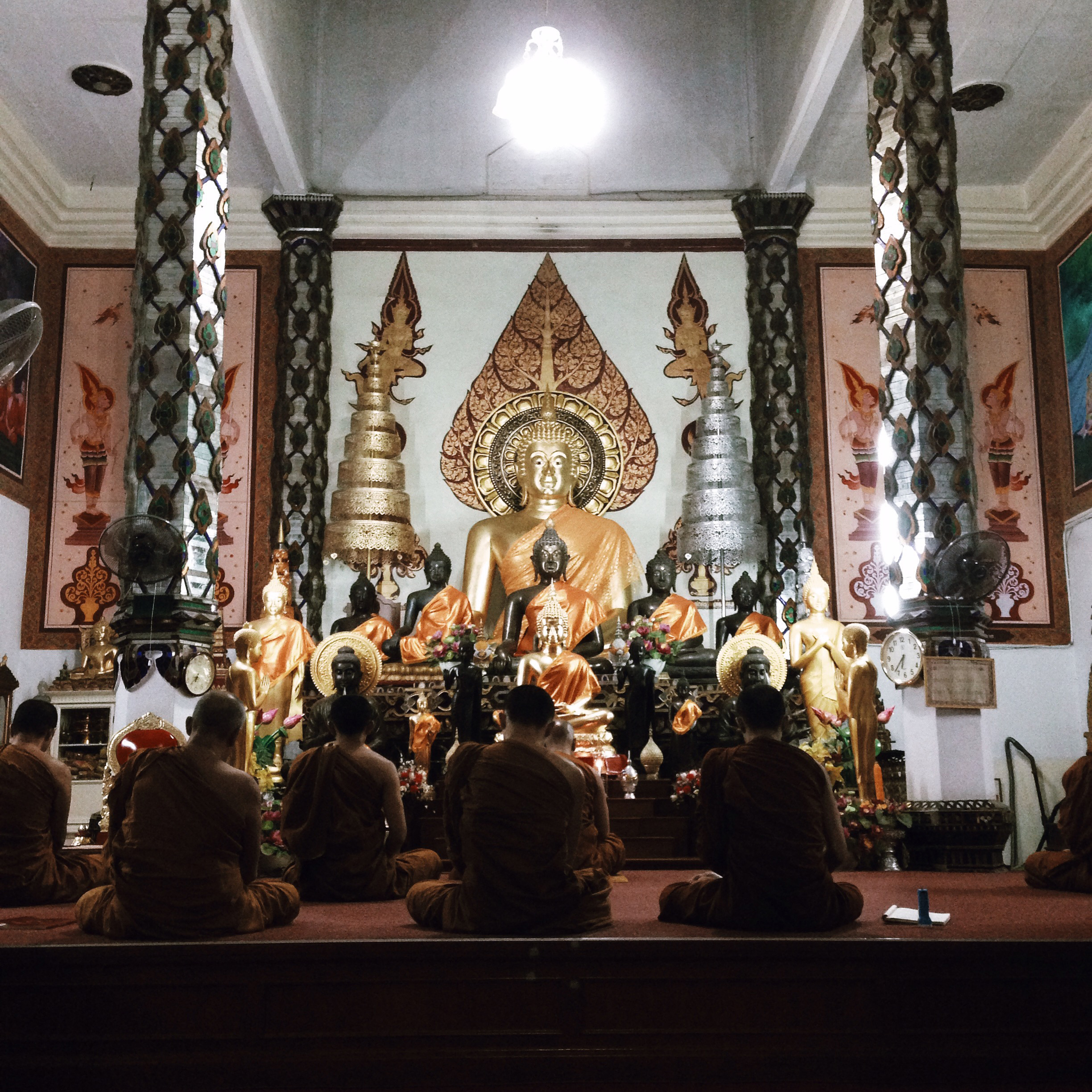 ภายในพระอุโบสถวัดเชตวันลำปาง